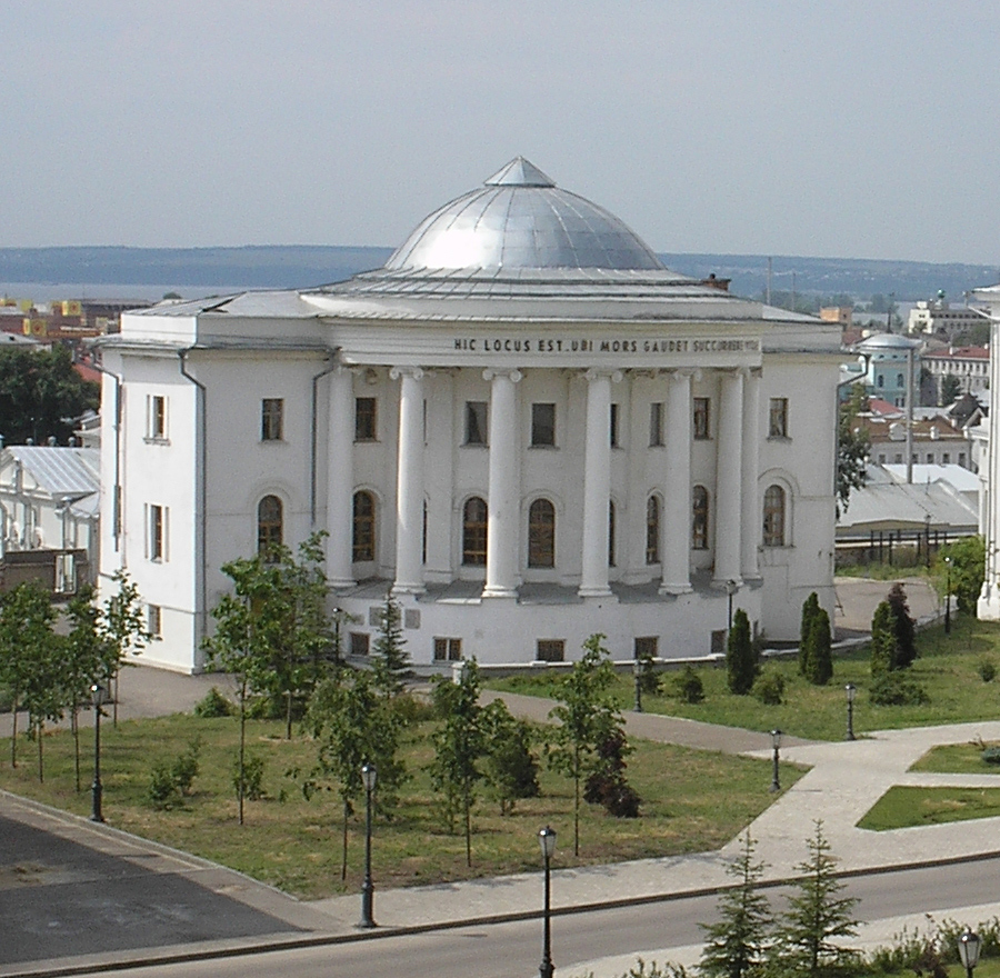 Театр Анатомический (Республика Татарстан, Казань, Кремлевская улица, 18)